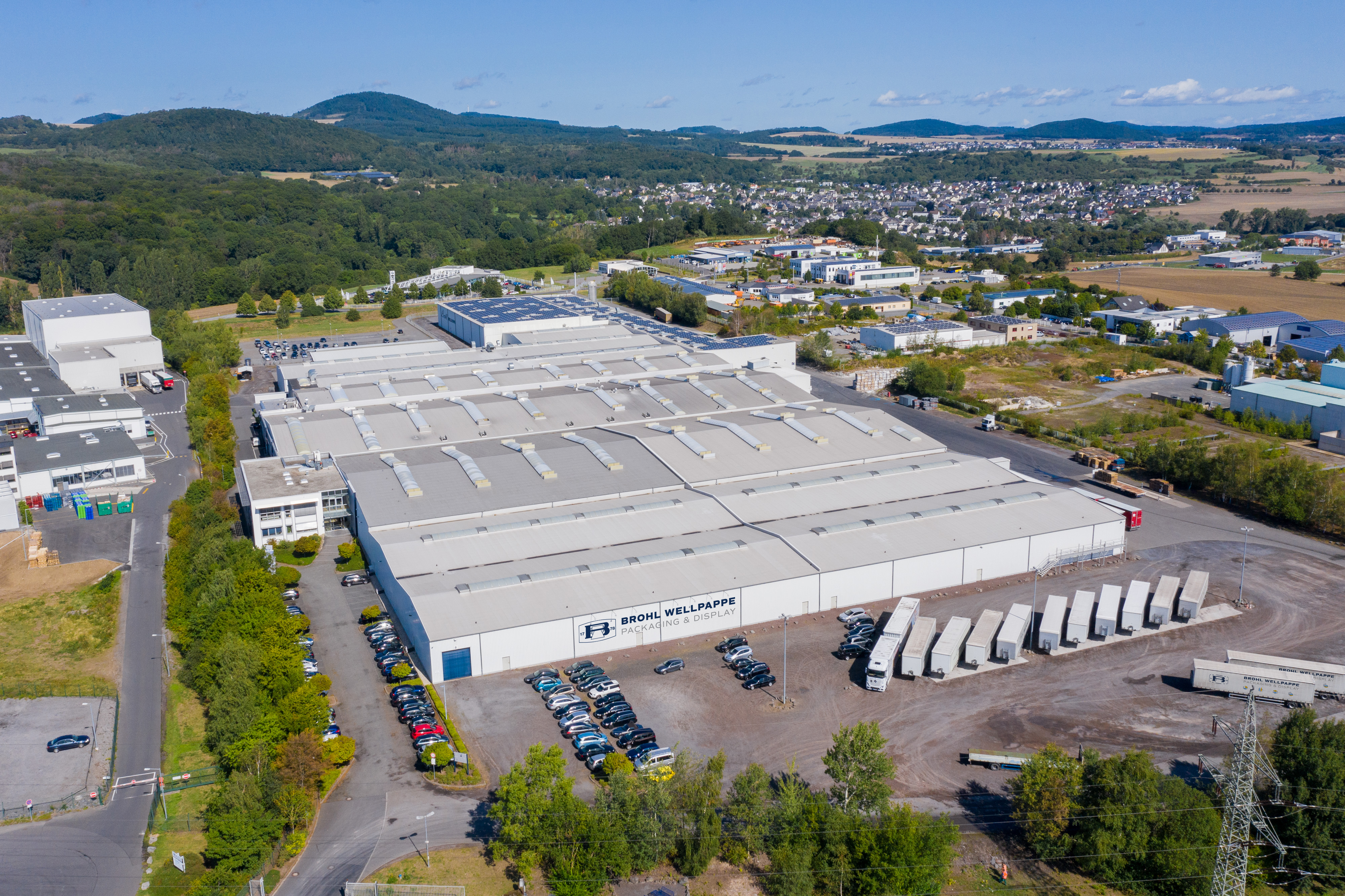 Luftaufnahme Brohl Wellpappe Mayen